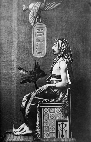 Pierre Loti en pharaon